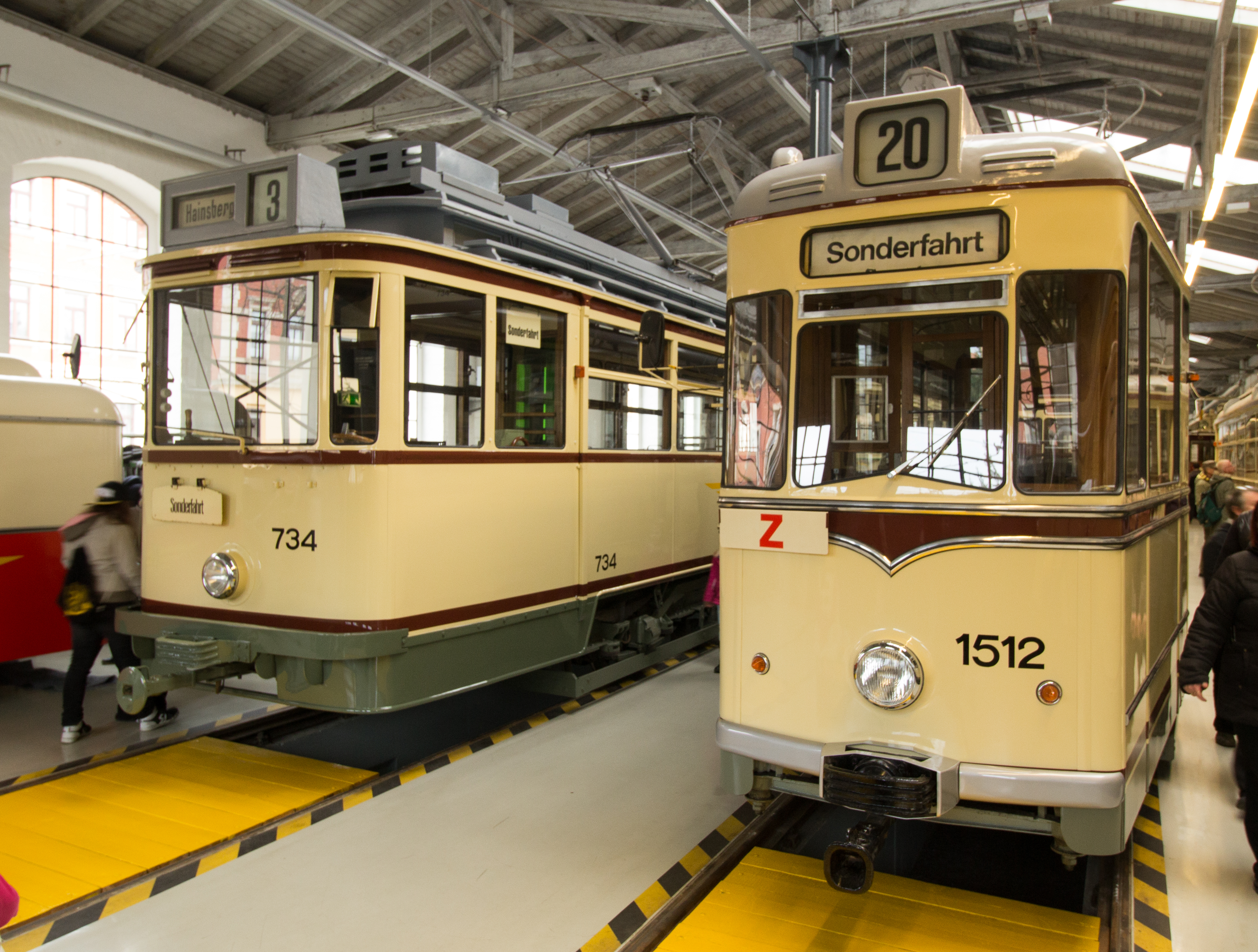 MAN-Einrichtungswagen 734 und Einheitstriebwagen T59E (1512) - Straßenbahnmuseum Dresden